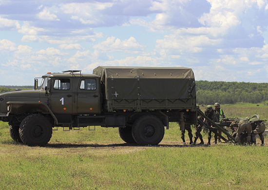 В Саратовской области на базе 631 регионального учебного центра (ракетных войск и артиллерии Сухопутных войск) на полигоне Центрального военного округа Широкий Карамыш завершились всеармейские соревнования по полевой выучке среди расчетов 120-мм минометных комплексов «Мастера артиллерийского огня – 2017».